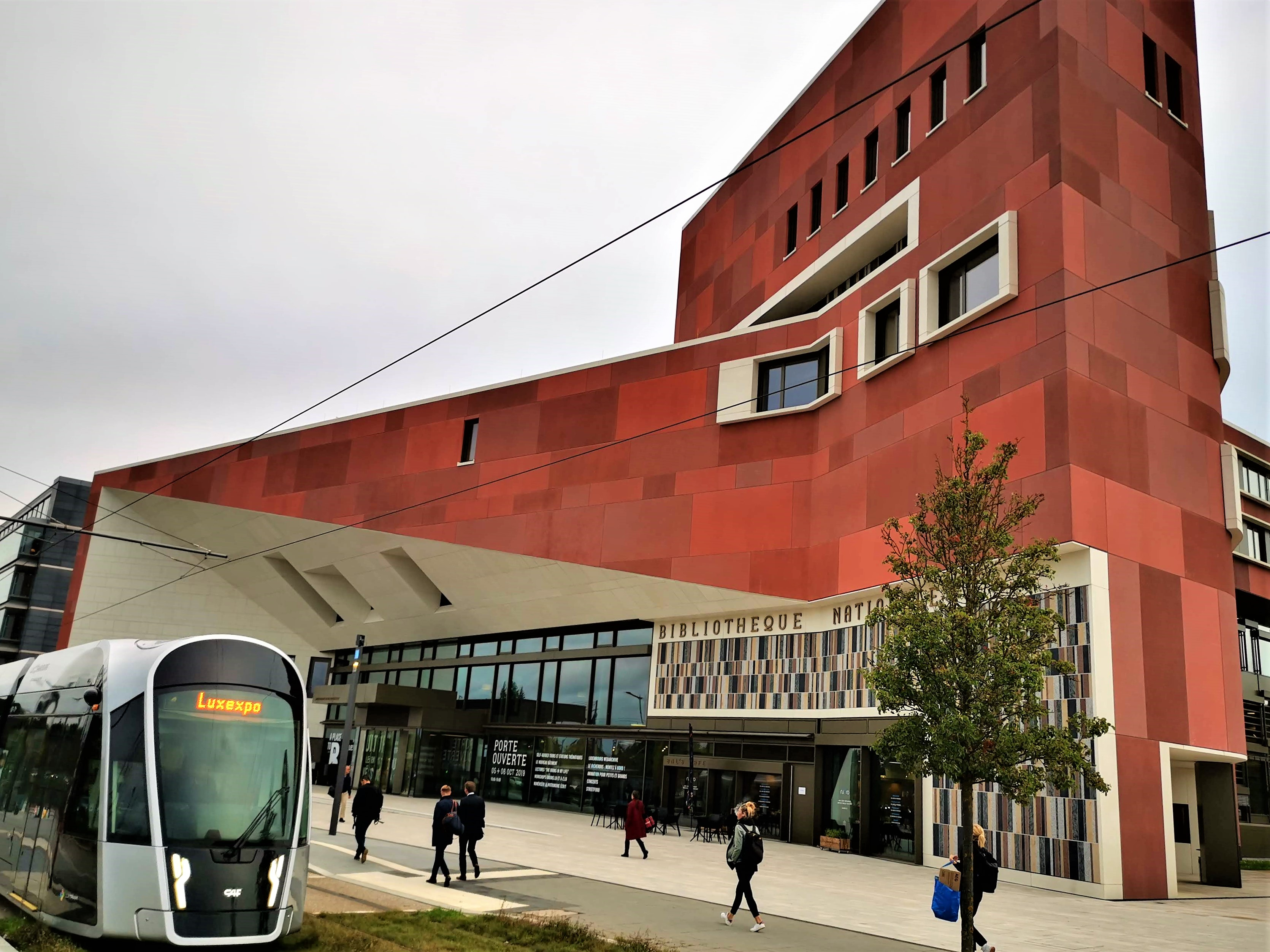 Luxembourg-Kirchberg, le bâtiment de la Bibliothèque nationale du Luxembourg.